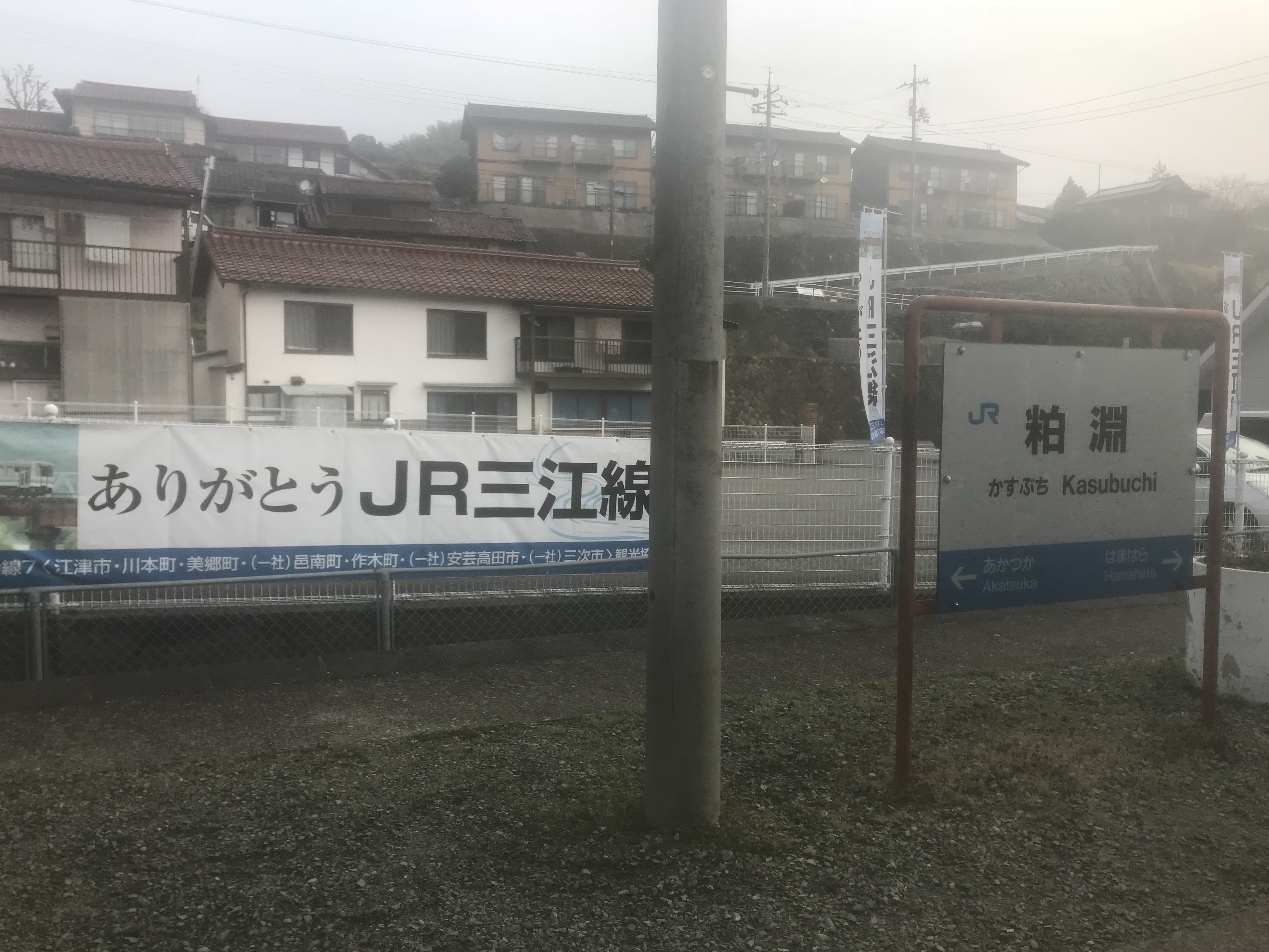 停車中の列車内より望む粕淵駅の駅名標とホーム